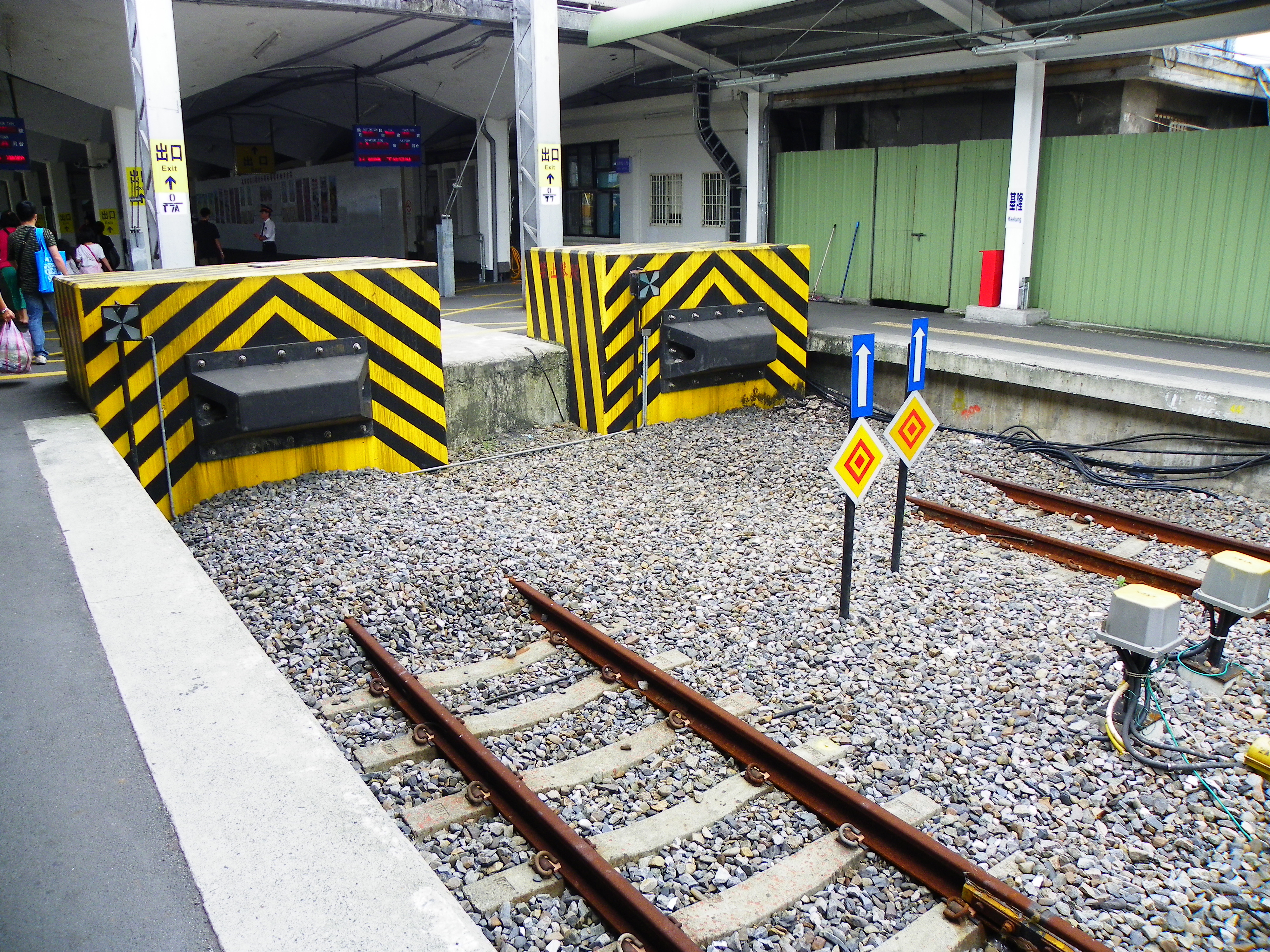 臺灣鐵路管理局基隆車站第一月臺與第二月臺頭端的止衝擋。